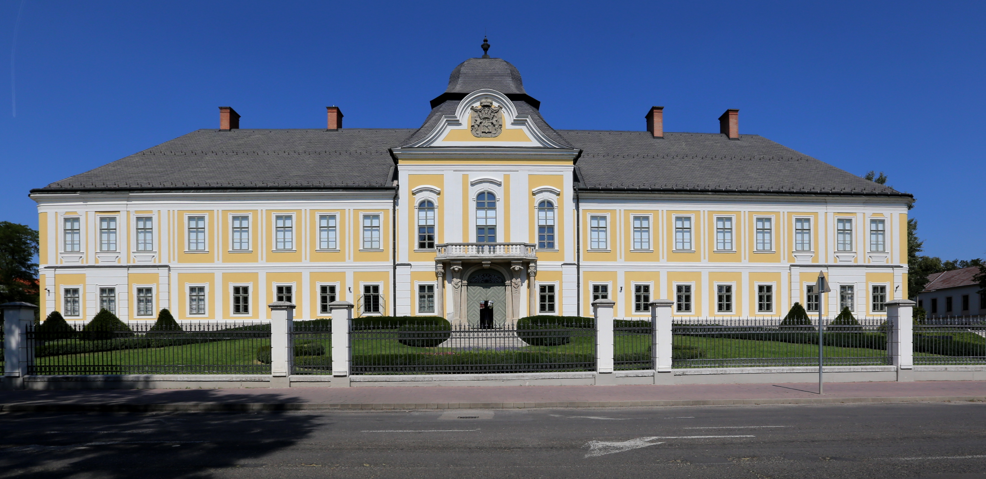 Grassalkovich-kastély (Hatvan)